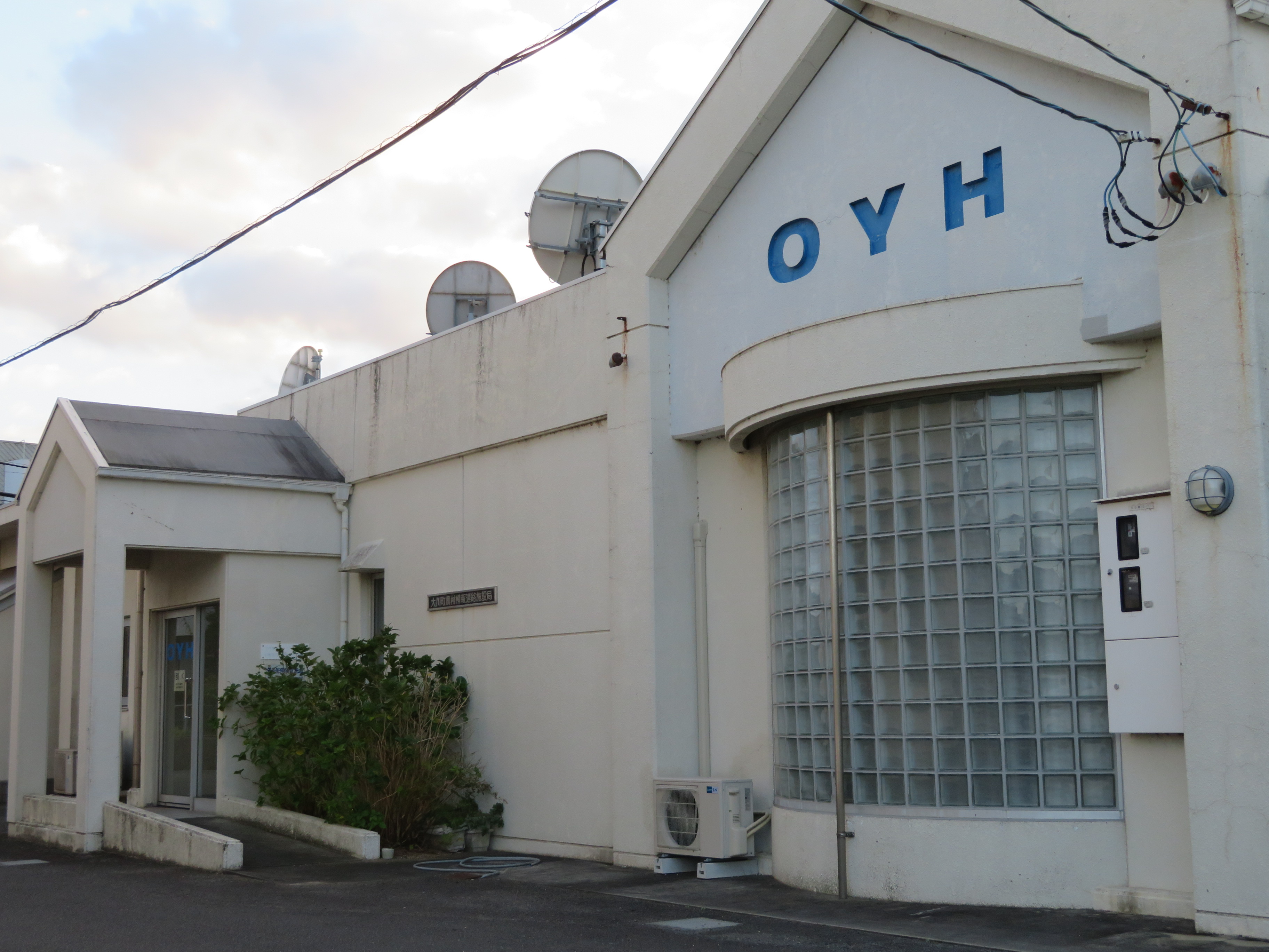 さぬき市映像放送センター